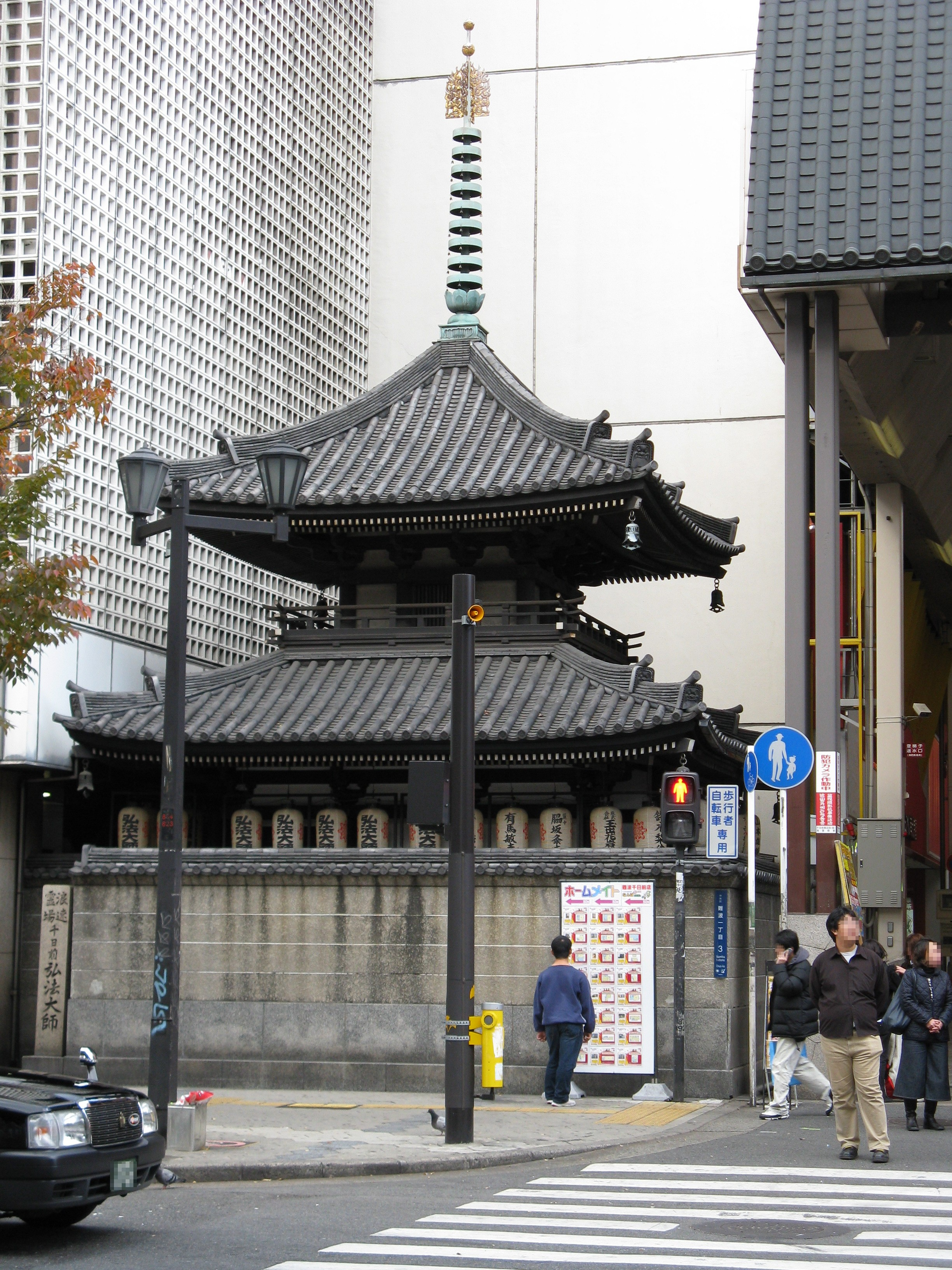 竹林寺